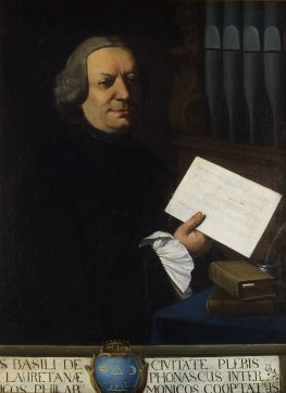 Carlo Magini, Ritratto di Andrea Basili, olio su tela, 1776-1778 o 1774? Fronte: AS BASILI DE CIVITATE PLEBIS ...E LAURETANAE PHONASCUS INTER ...MICOS PHILARMONICOS COOPTATUS